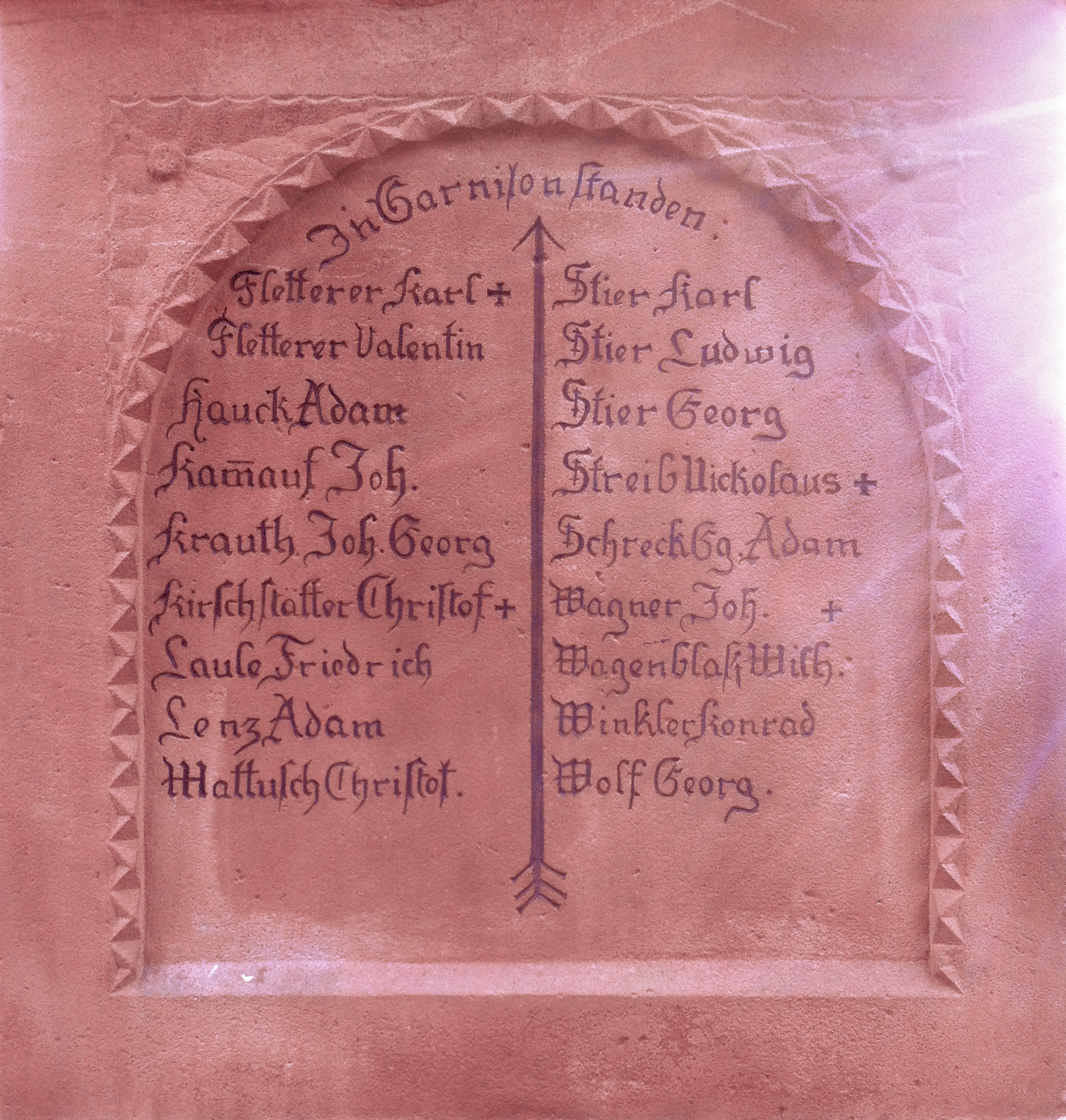 Kriegerdenkmal Eschelbronn